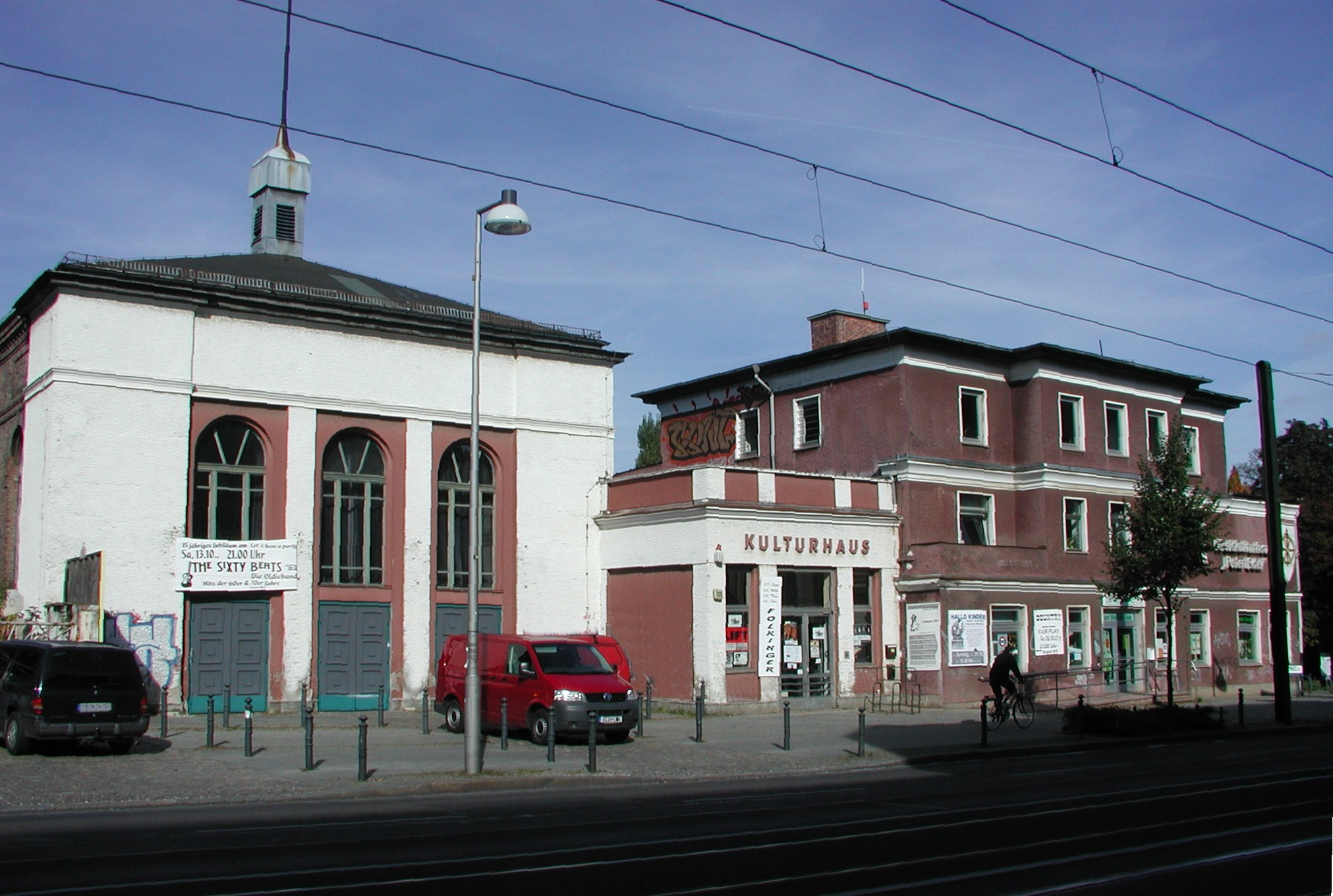 Berlin-Weißensee, Berliner Allee: eh. Brauerei neben Kulturhaus